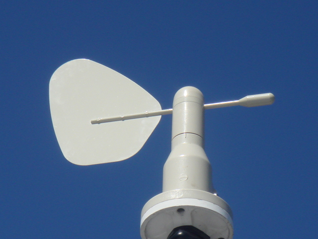 風向のみを計測するためのセンサー